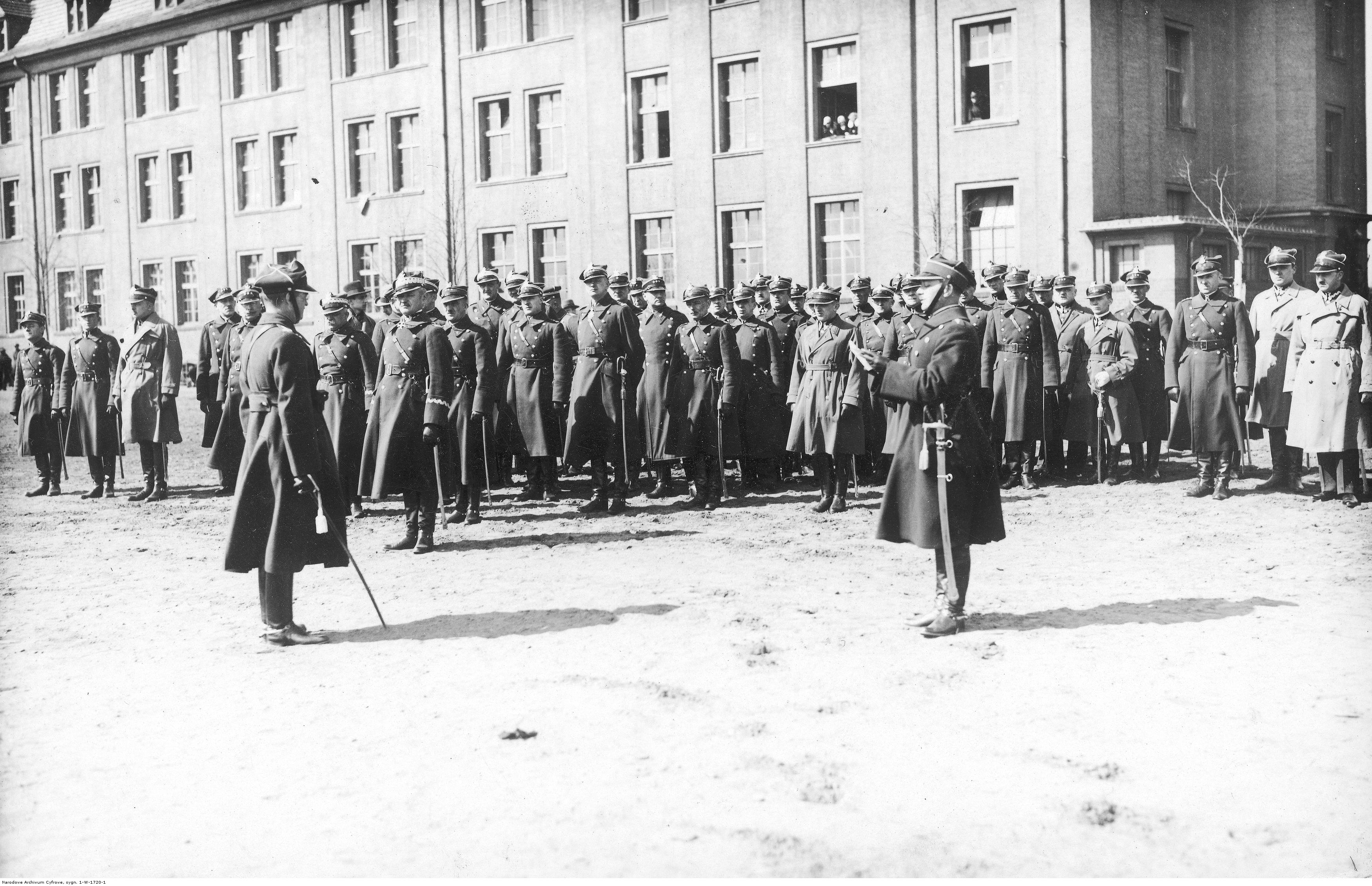 Jubileusz dziesięciolecia 7 Batalionu Saperów w Poznaniu; kwiecień 1929. Odczytywanie rozkazu dziennego wydanego z okazji jubileuszu. Widoczni m.in.: gen. Kazimierz Dzierżanowski, gen. Anatol Kędzierski, płk Grabowski, płk Aleksander Szychowski.